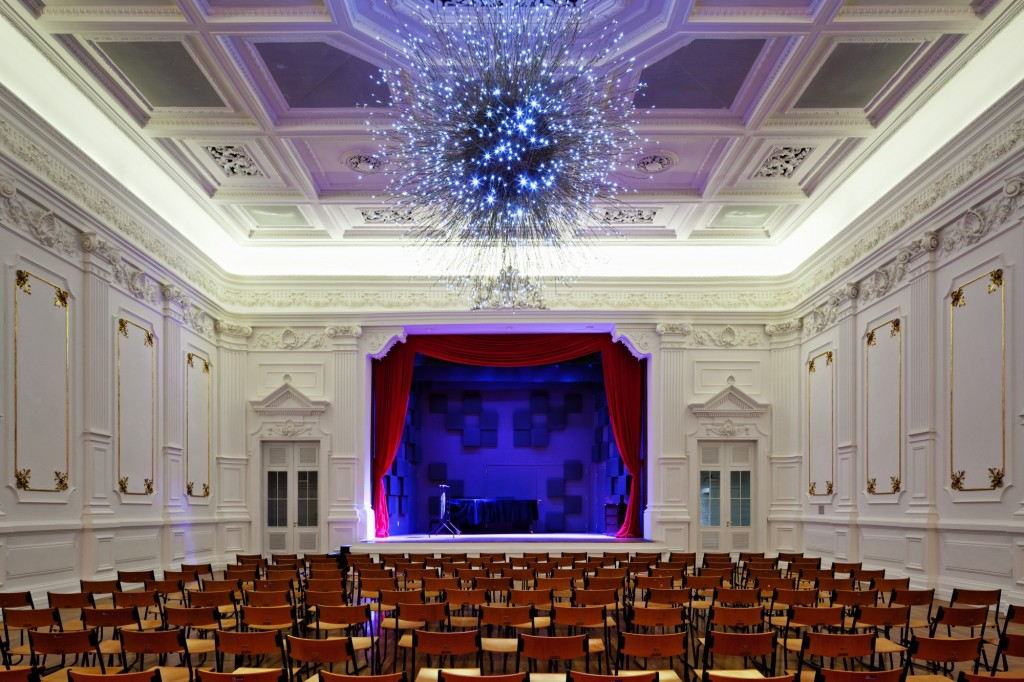 Sala do Conservatório, localizada na Praça das Artes. O local é sede oficial do Quarteto de Cordas da Cidade de São Paulo. Durante muitos anos abrigou o Conservatório Dramático e Musical de São Paulo.